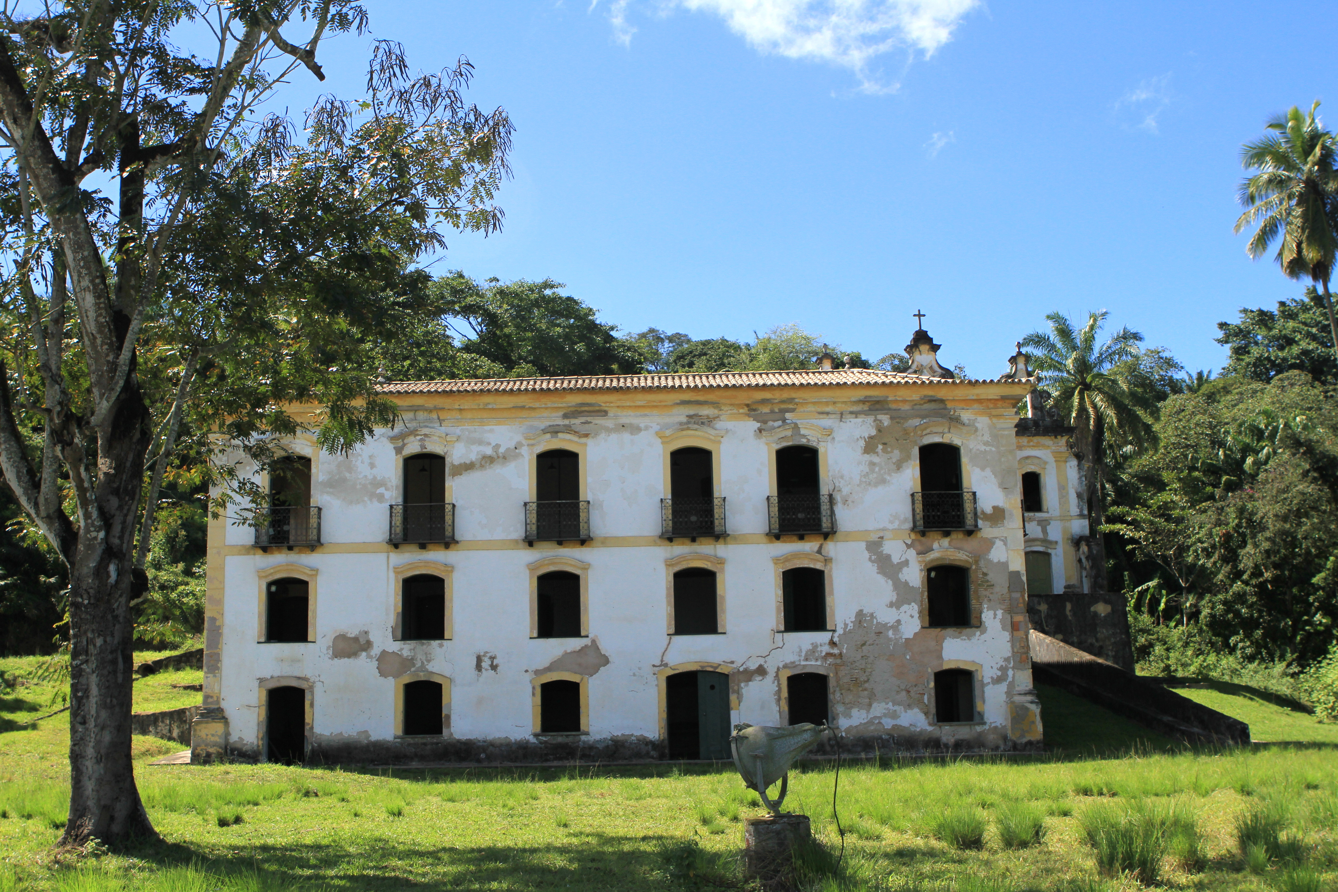 Caboto. Museu Wanderlei de Pinho. Foto- Tatiana Azeviche (39)